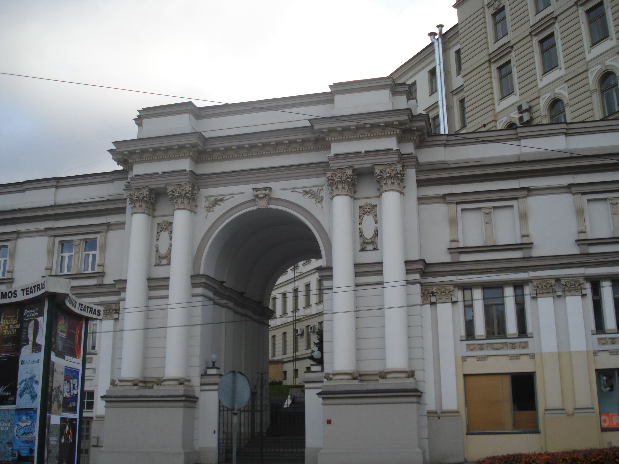 Управление Полесских железных дорог на Погулянке Polesės geležinkelio direkcijos rūmai Vilniuje (AB „Lietuvos geležinkeliai“ administracinis pastatas). J. Basanavičiaus g. 14 / Mindaugo g. 12 Headquarter of Lithuanian Railways Company in Vilnius. Architect Tadeusz Maria Rostworowski